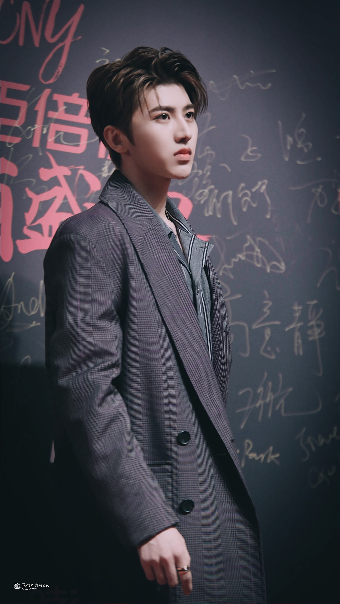 中文（中国大陆）: 2018年11月28日，蔡徐坤出席“2018时尚COSMO美丽盛典”。